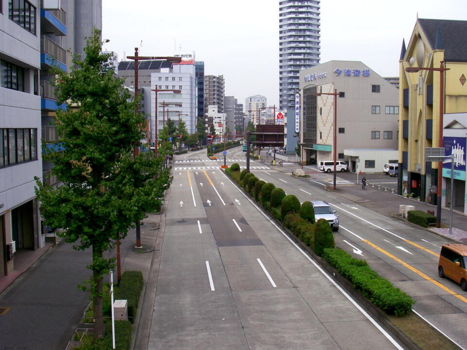 桜通（名古屋市）終端の内山町交差点（千種区）歩道橋上より撮影。